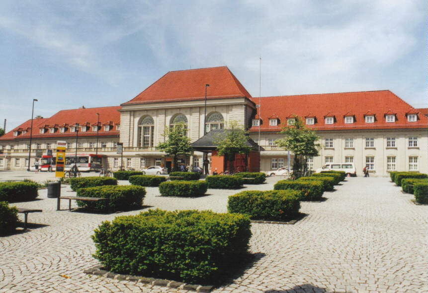 Bahnhof von Weimar, 18. Mai 2003. Aufnahme: Steffen Mokosch